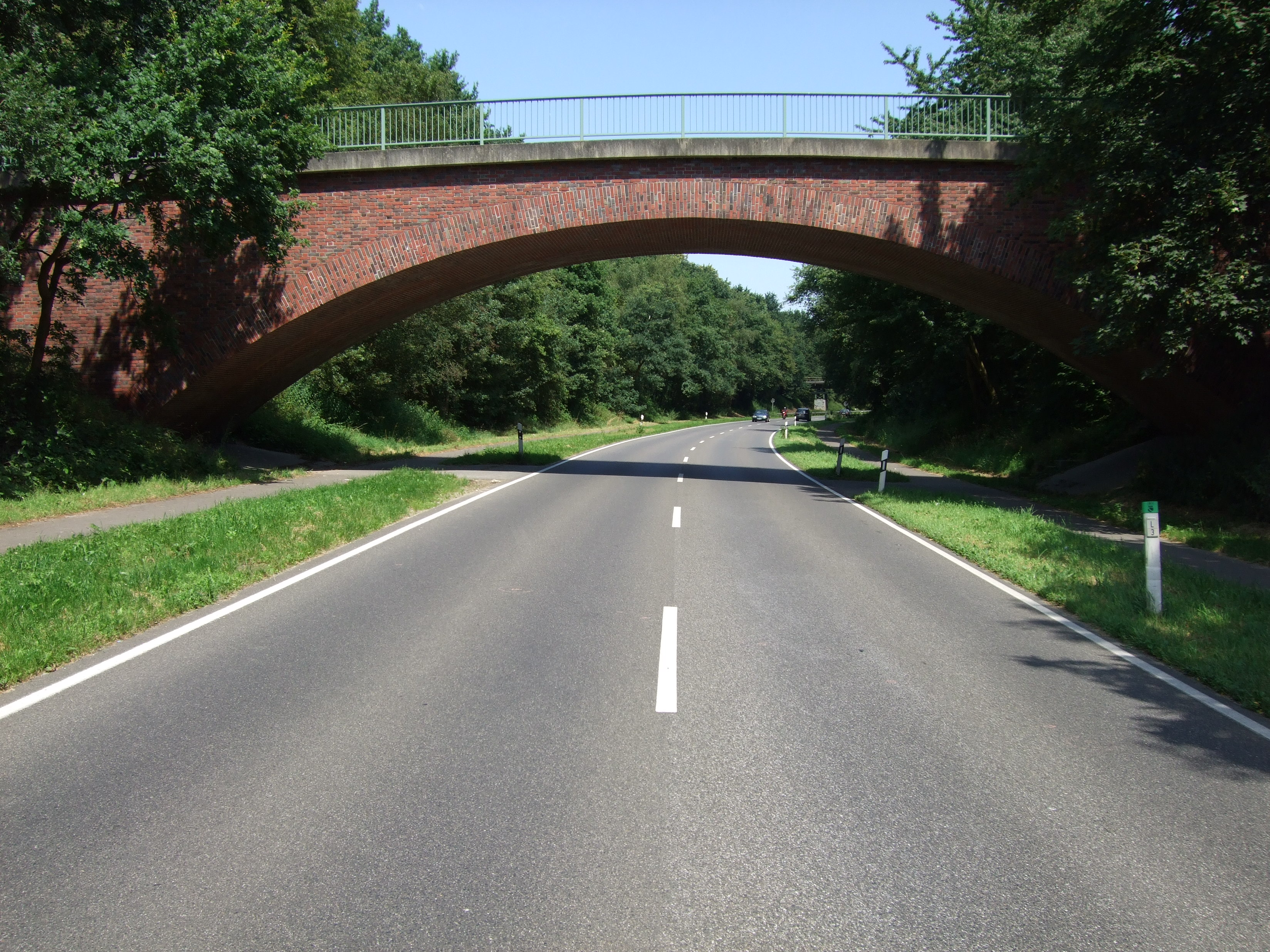 Friedhofsbrücke über die ehemalige Rennstrecke Grenzlandring im Jahr 2007